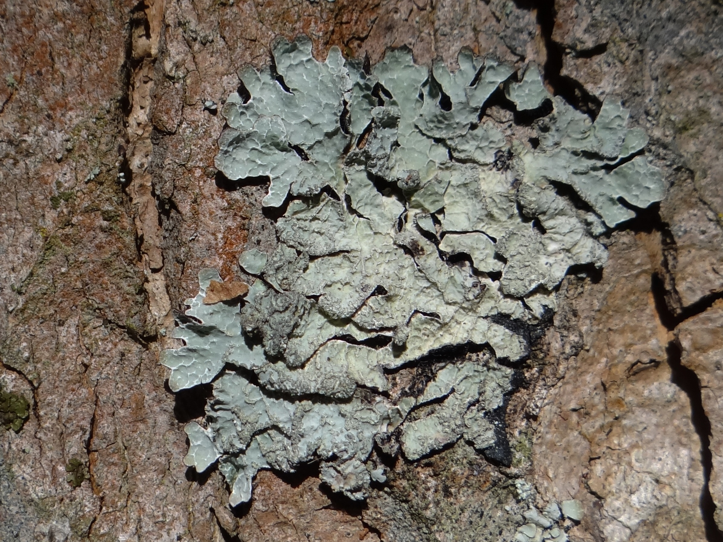 Parmelia sulcata